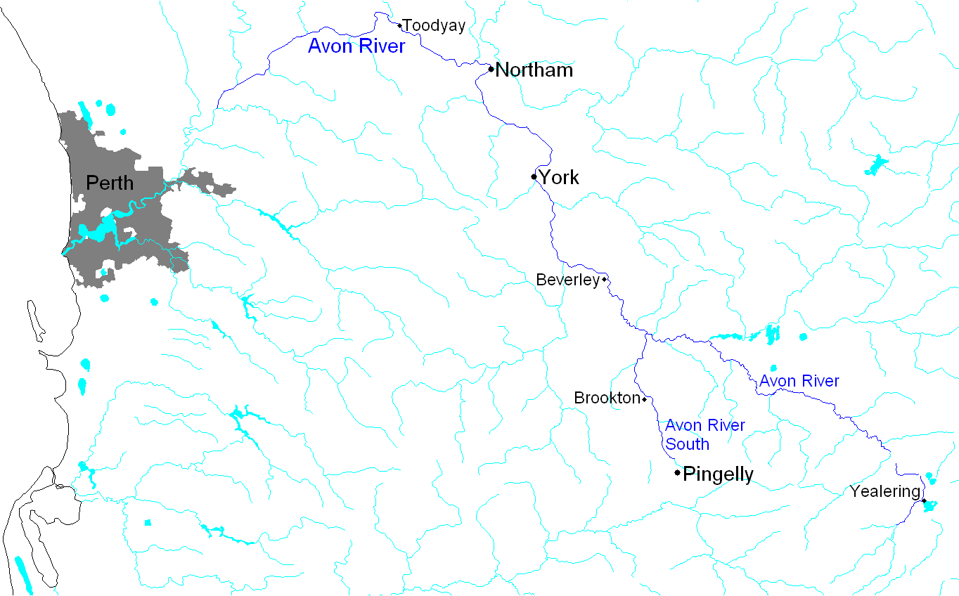 carte de la Rivière Avon en Australie-Occidentale